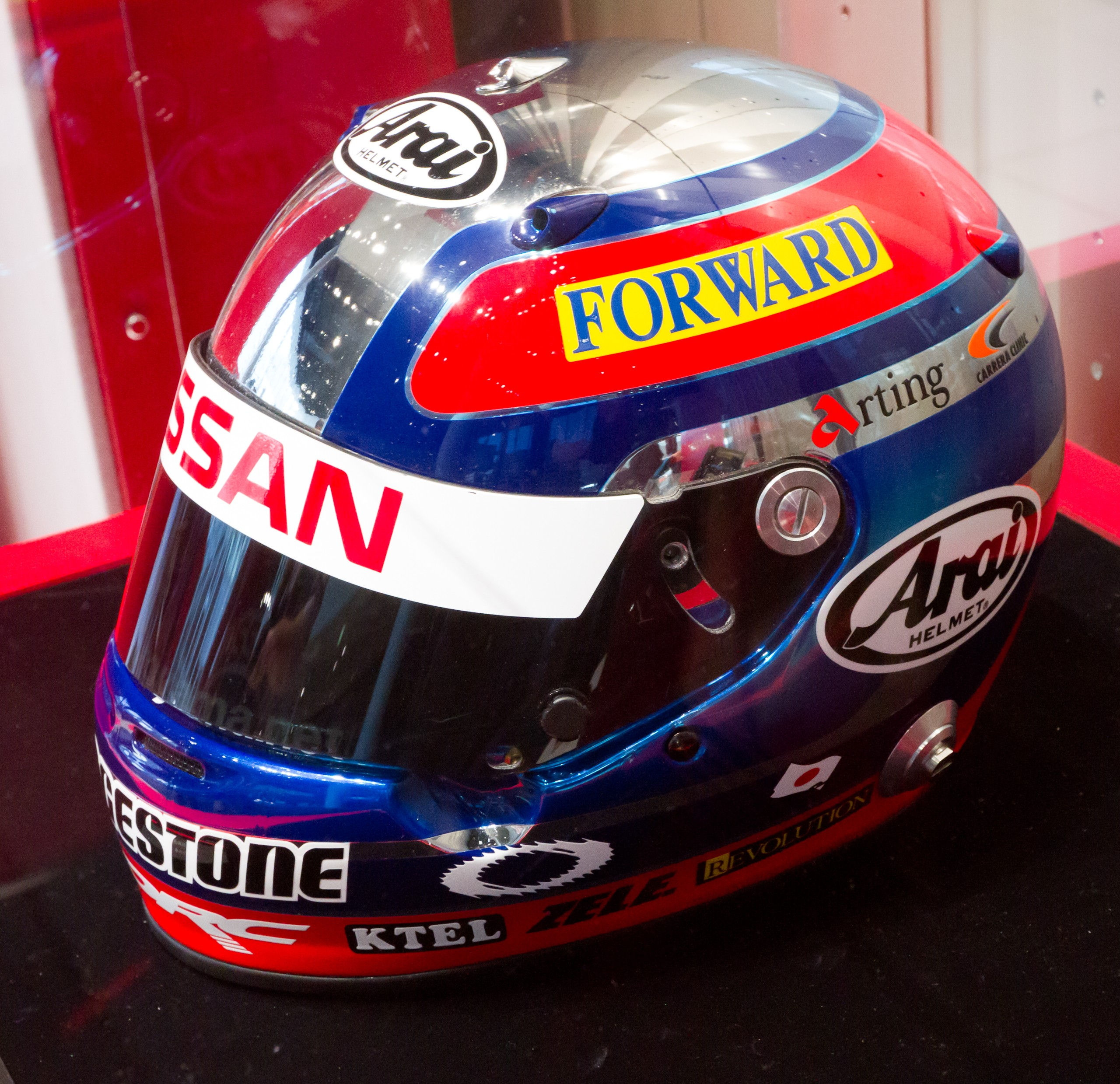 2005 Satoshi Motoyama helmet